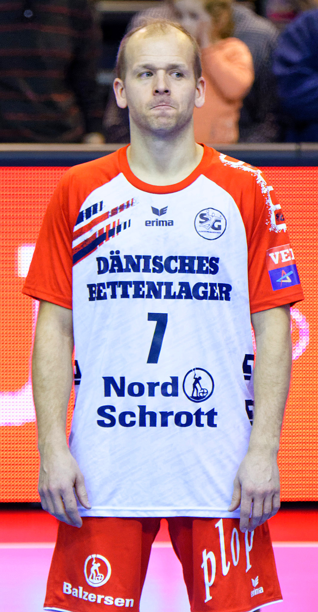 Rencontre de phase de groupe de la Ligue des Champions 2015-16 entre le PSG et SG Flensburg. A la Halle Carpentier (Paris), le 7 mars 2016.